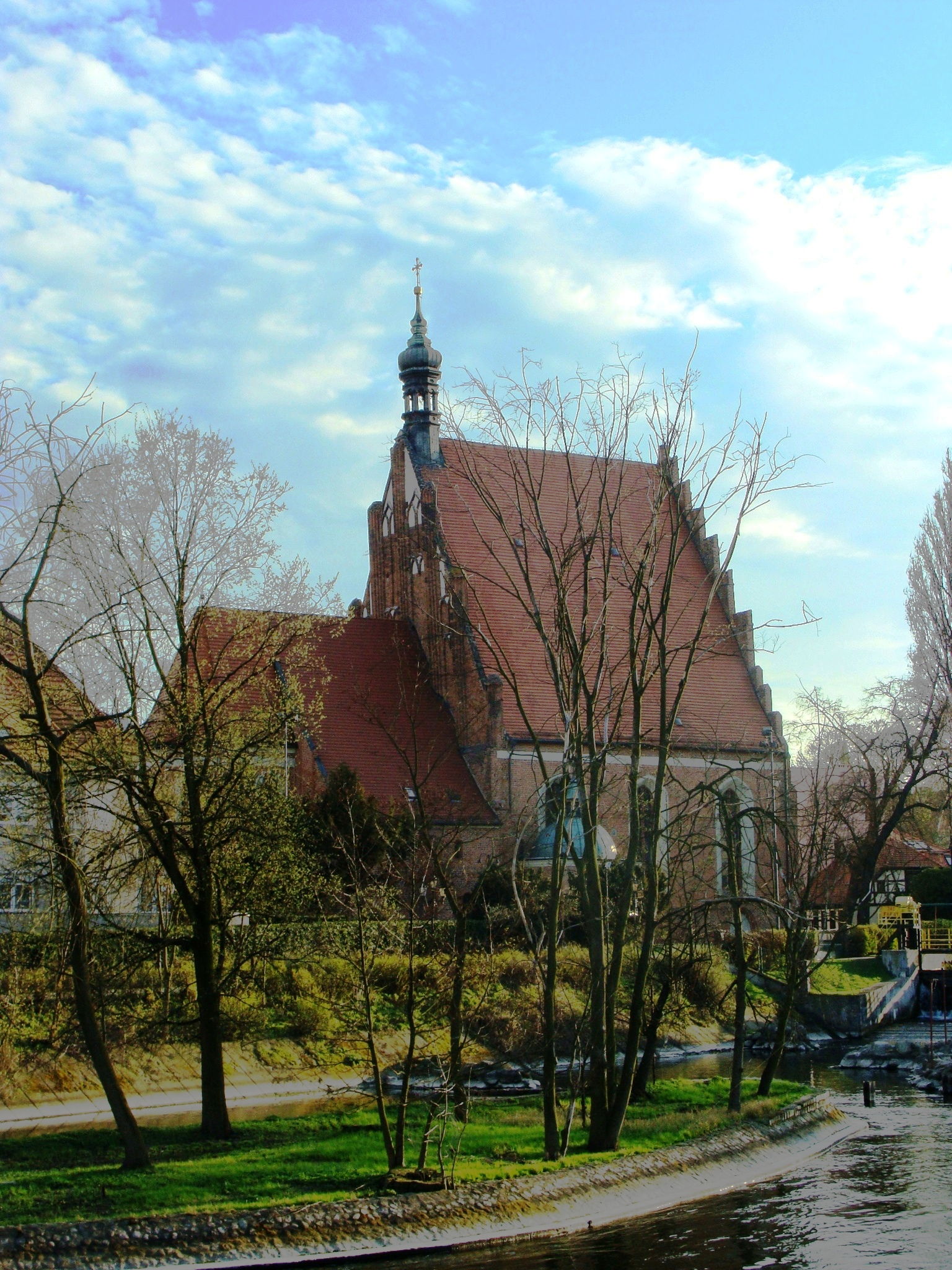 Bydgoszcz, kościół par. p.w. śś. Marcina i Mikołaja, 1466-1502